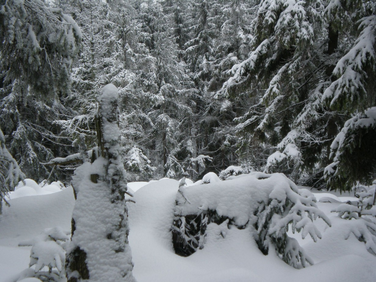 Vrchol Hradiště (840 m) pod listopadovým sněhem